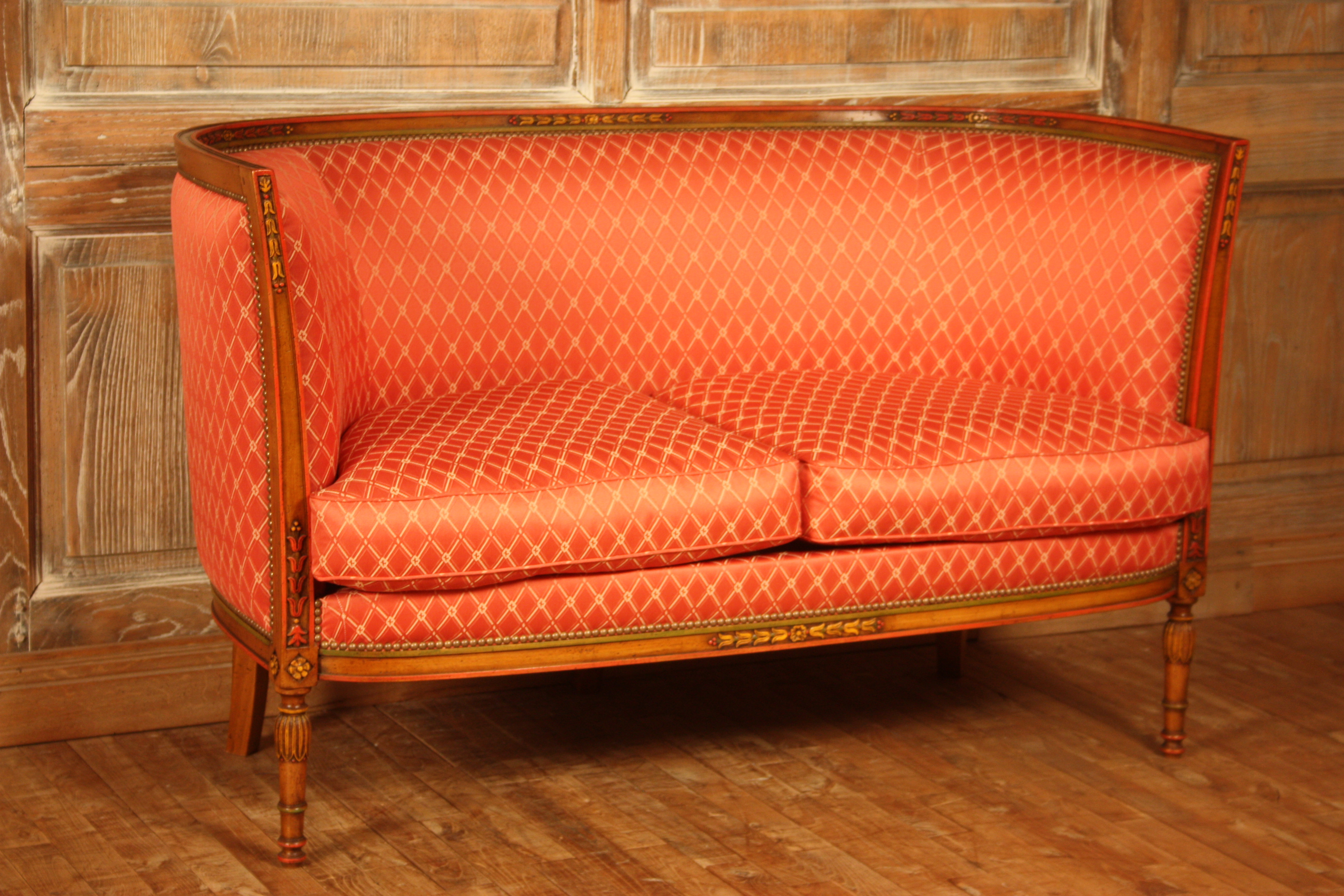 Canapé "Letourneur" de style Directoire : réplique exacte d'un modèle ancien, réalisée par les Ateliers Allot Frères.